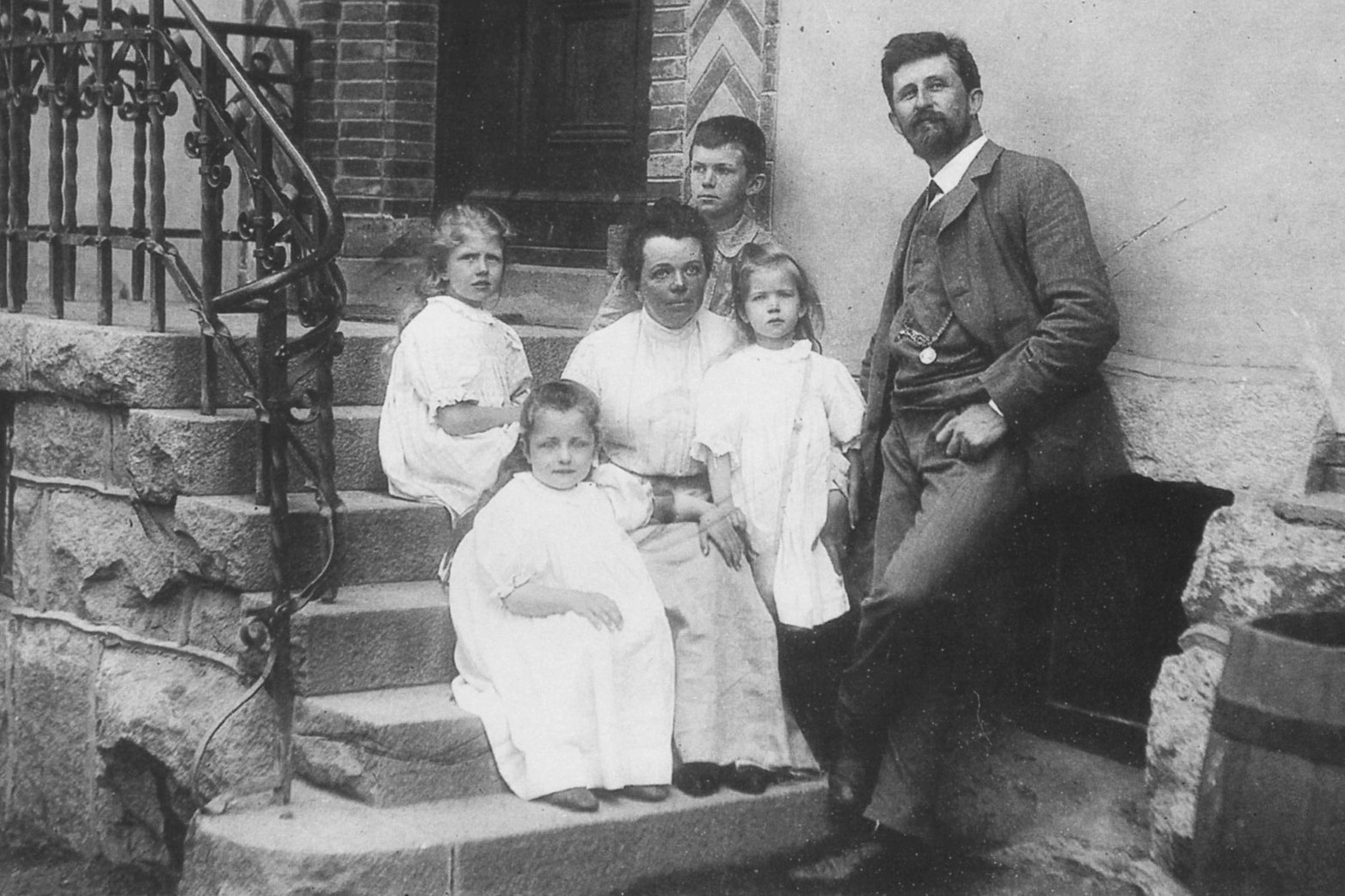 Arkitekt Rudolf Enblom med familj. Fr. vänster: Sigrid, Karin, hustrun Helfrid, sonen Walfid, Lilia och Rudof Enblom.